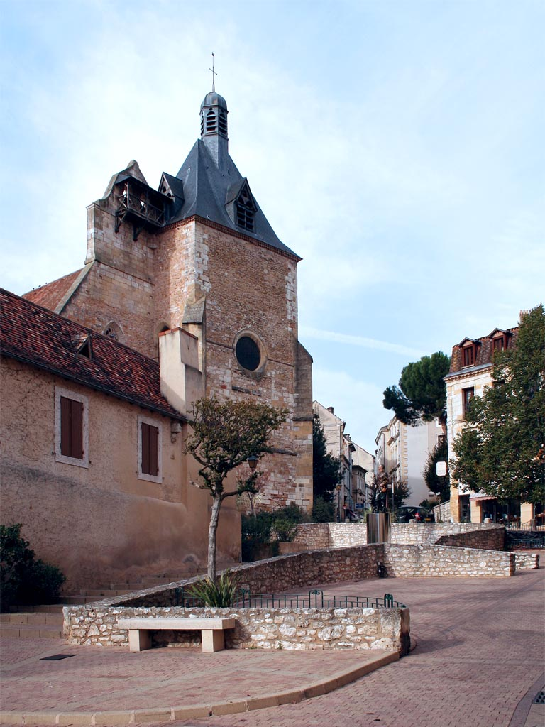 Place Pélissière à Bergerac